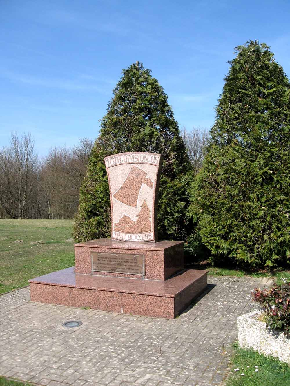 Gedenkstätte an die Gefallenen der 70th US-Infantry Divison 1944-45 in Spicheren